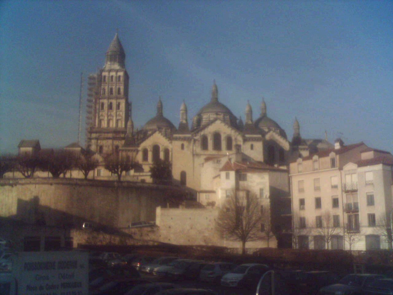 Summary Kathedrale Saint-Front in Périgueux, selbst aufgenommen am 22.12.2005 mit einem S 65-Fotohandy von Benutzer:Bordeaux. Licensing